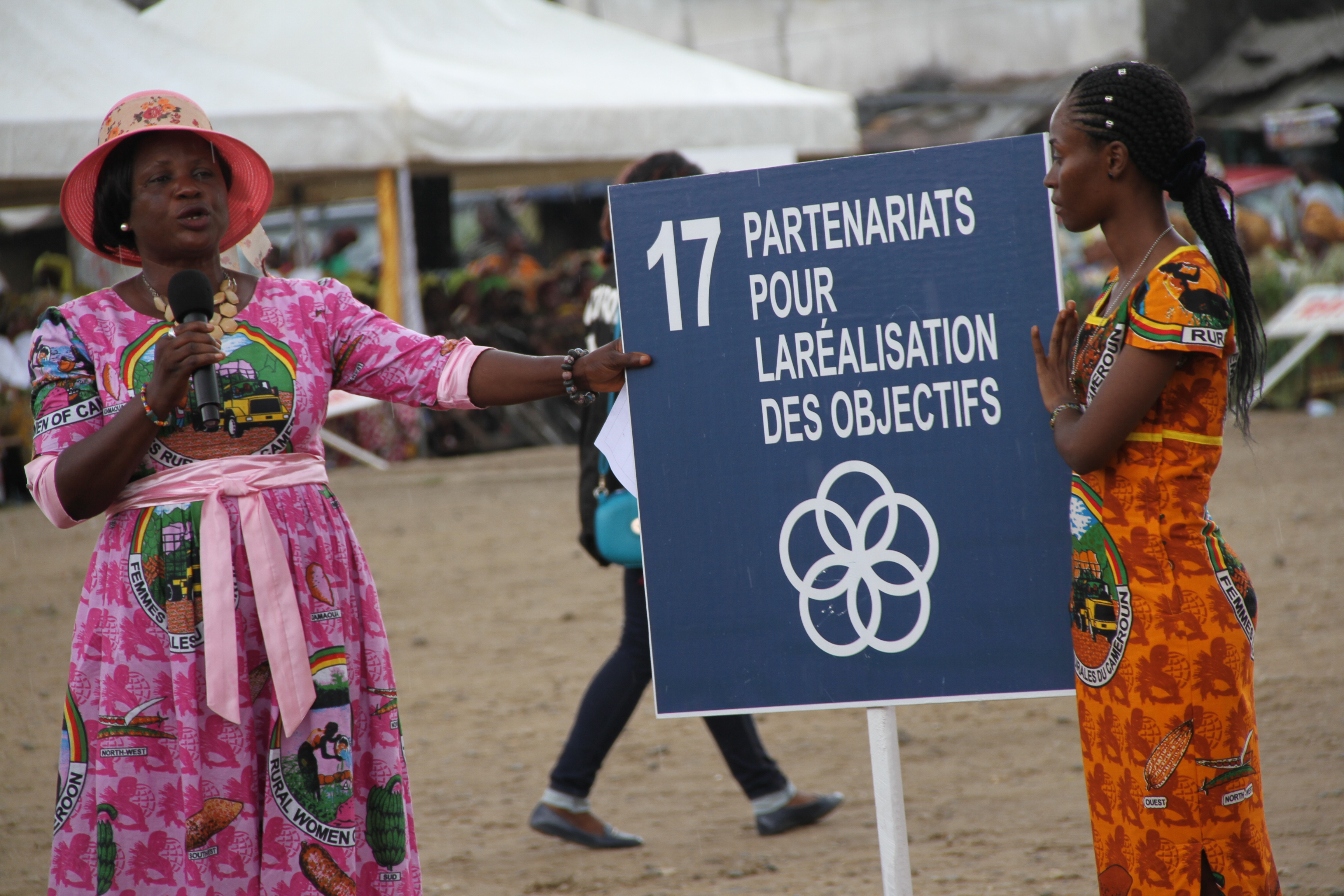 Les objectifs de développement durable présentés pendant la journée internationale de la femme rurale à Douala 17. Partenariats pour la réalisation des objectifs